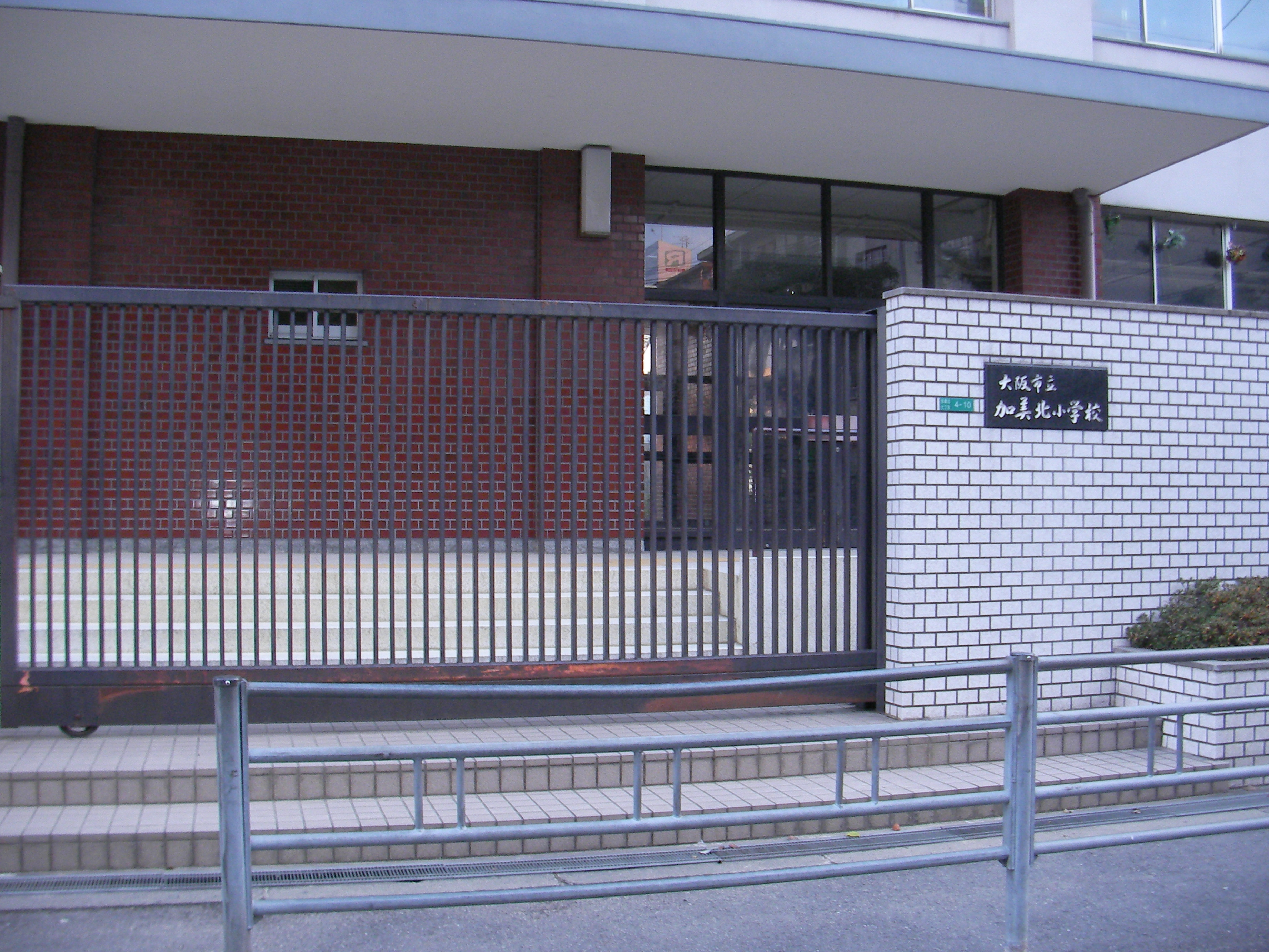 大阪市立加美北小学校